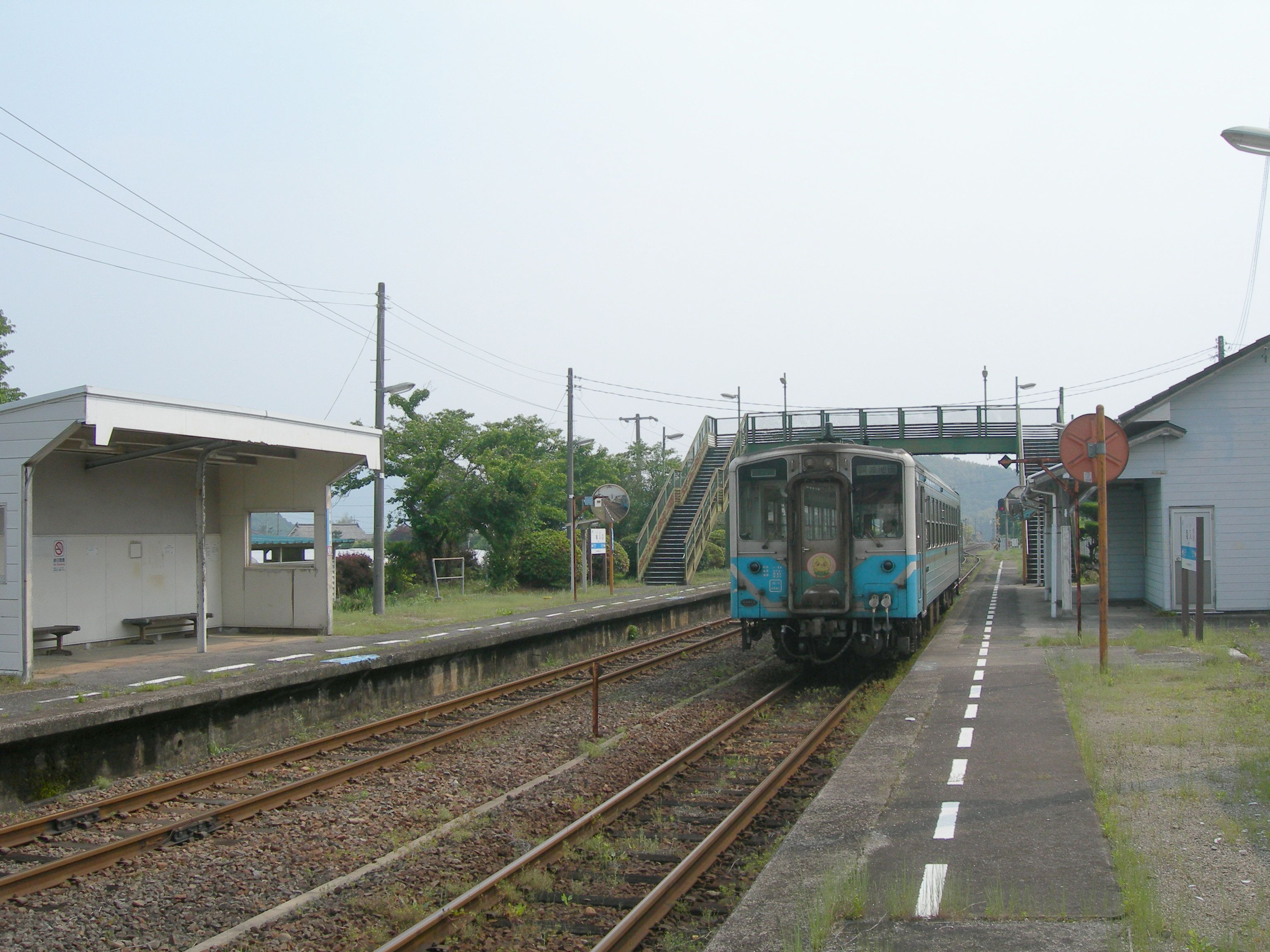 塩入駅ホーム